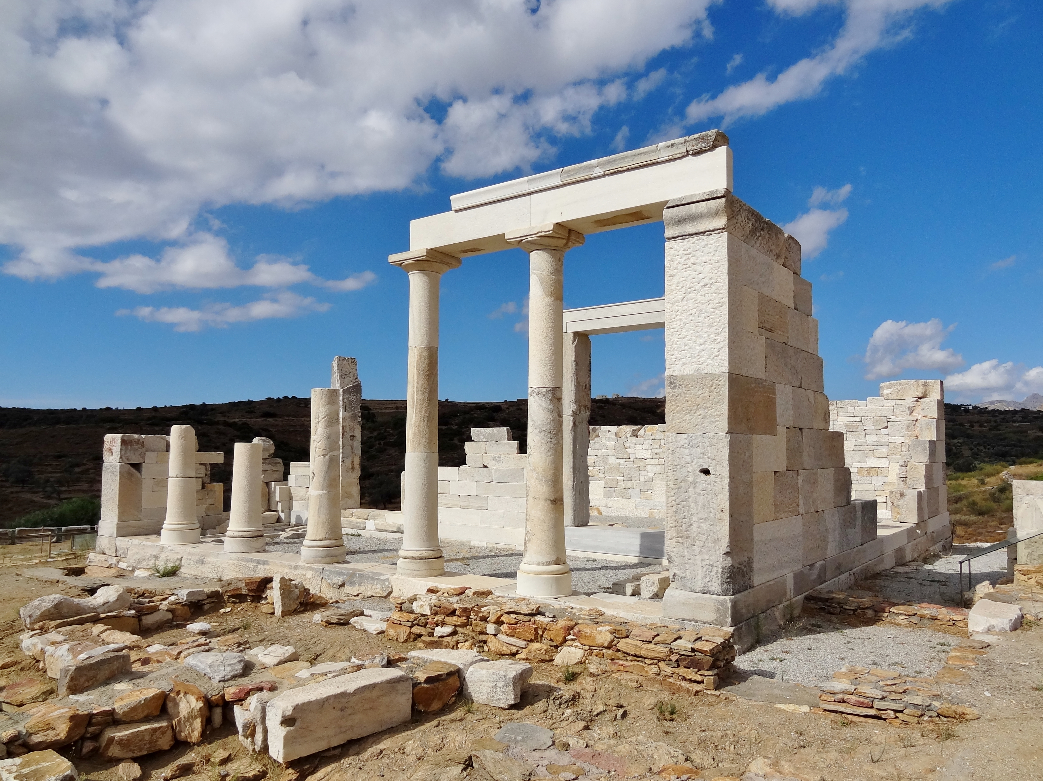 Demeter-Tempel von Gyroulas bei Ano Sangri auf Naxos, Kykladen, Griechenland